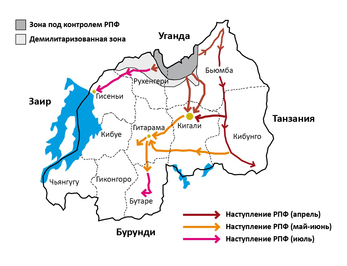 Карта, показывающая продвижение РПФ во время геноцида в Руанде в 1994 году.